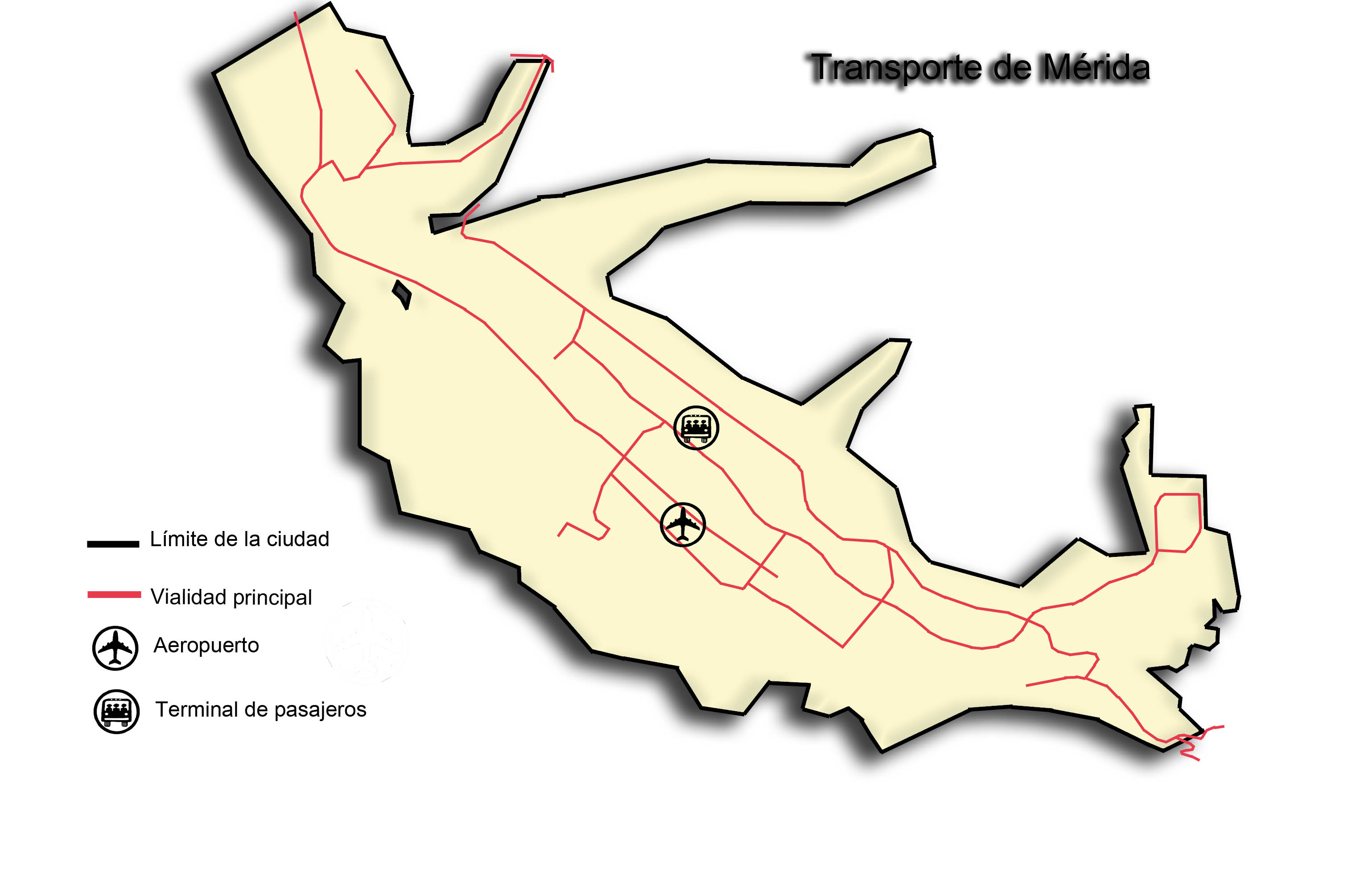 Mapa de Transporte de la ciudad de Mérida, Venezuela. Se identifican las principales avenidas de la ciudad así como el terminal regional de autobuses y el aeropuerto nacional. Hecho por Jorge Paparoni. Para uso externo favor indicar fuente y autor.